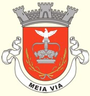 Brasão da Freguesia